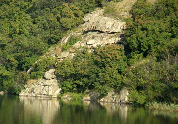 РЛП "Приингульский" - каменные химеры